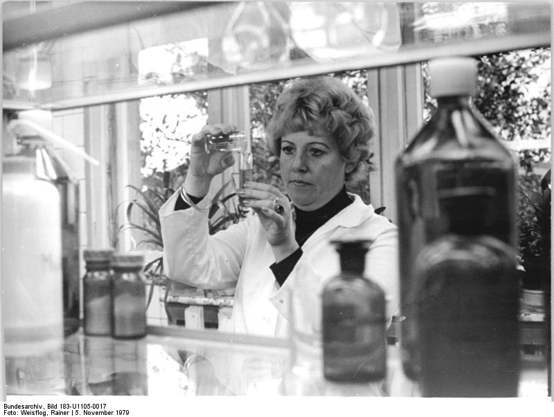 ADN-ZB-Weisflog-5.11.79-rw-Berlin: Vorbereitung "Tag des Chemiearbeiters"-Rund 335.000 Chemiearbeiter der DDR begehen am 11.11.79 ihren diesjährigen Ehrentag. Zu ihnen gehört Helga Loeß aus dem VEB Berlin-Chemie. Die dreifache Aktivistin ist Laborantin im Produktionslabor. Ihr Kollektiv in der Tablettierungsabteilung, in dem sie Gewerkschaftsvertrauensmann ist, wurde neun Mal hintereinander als "Kollektiv der sozialistischen Arbeit" ausgezeichnet."